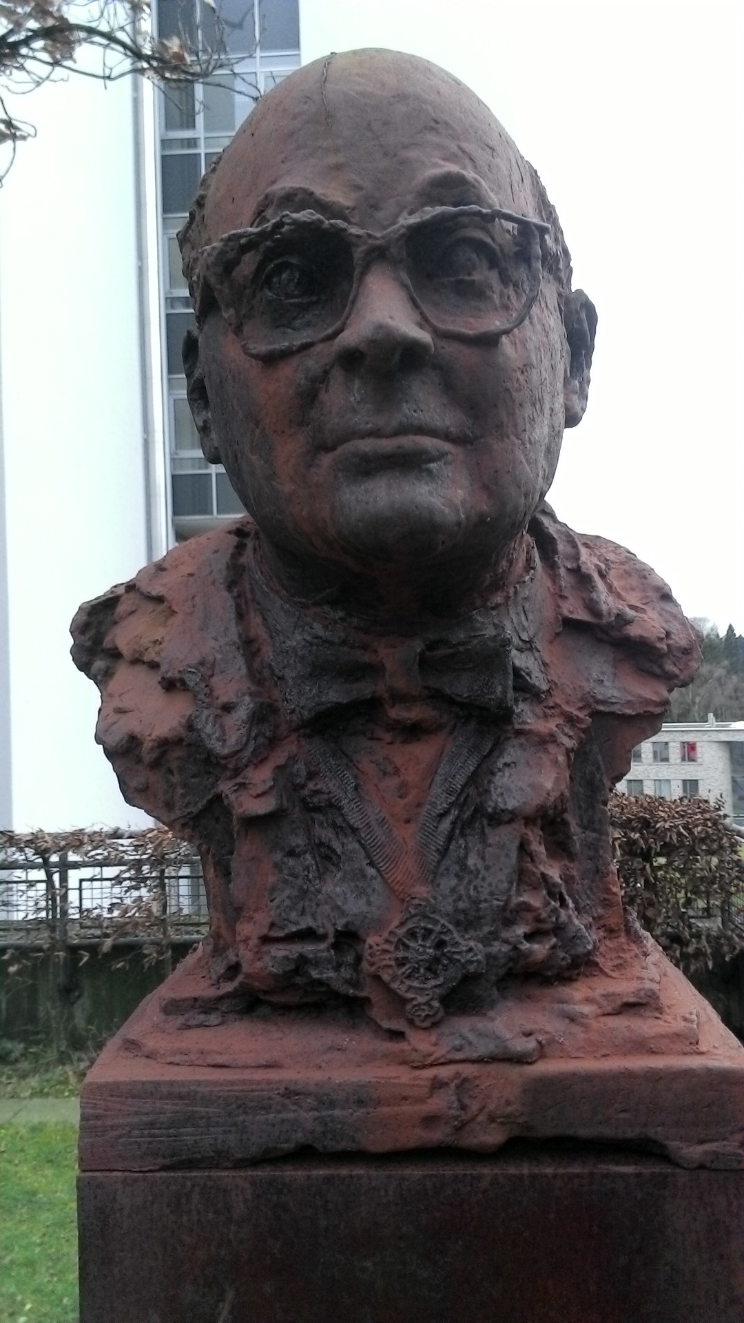 in Erinnerung an den Augenarzt